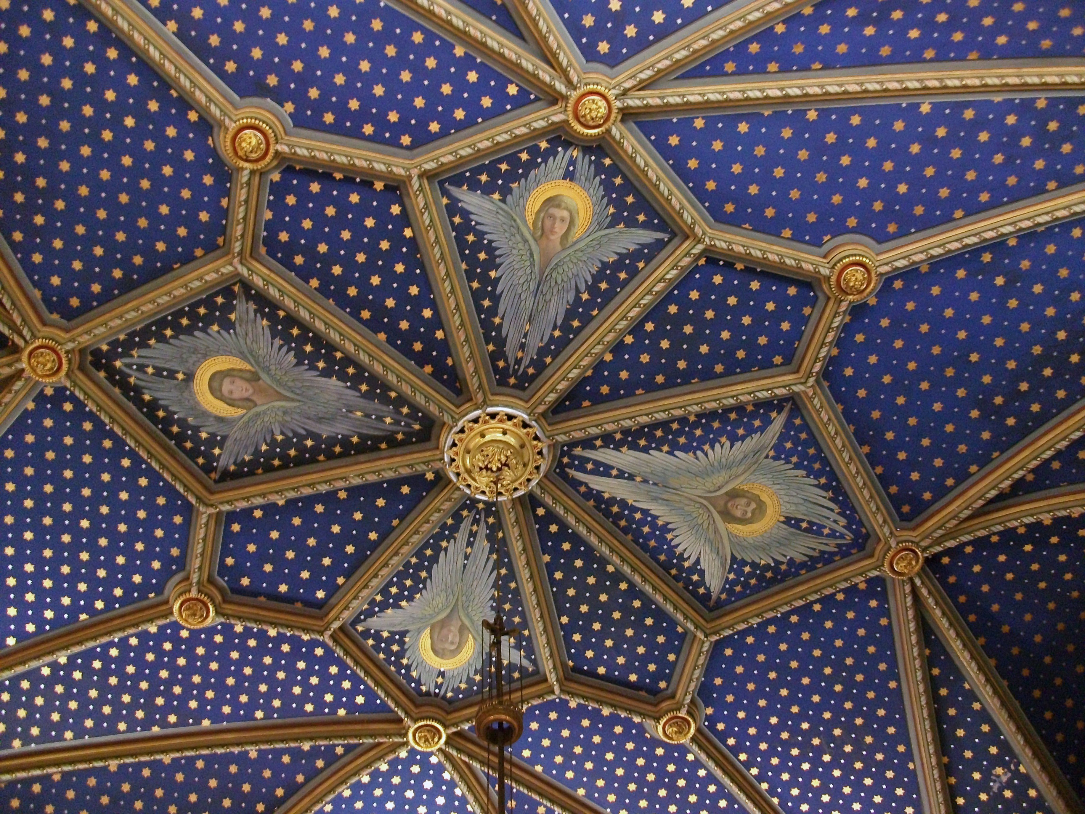 Voltes neogòtiques de l'anomenada Estança del Duc, Palau Ducal de Gandia.